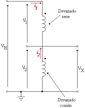 Esquema simplificado autotrafo